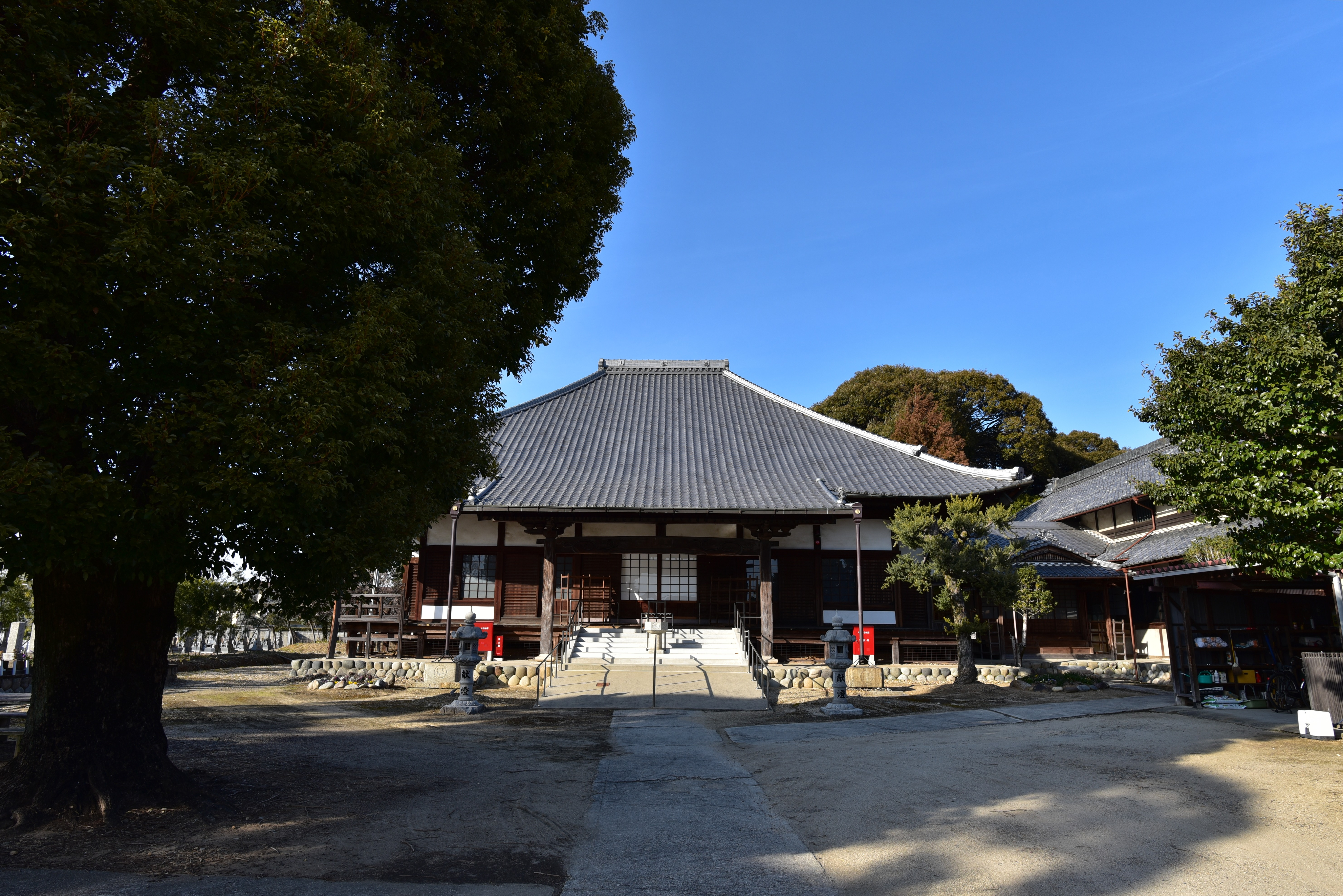 常安寺本堂